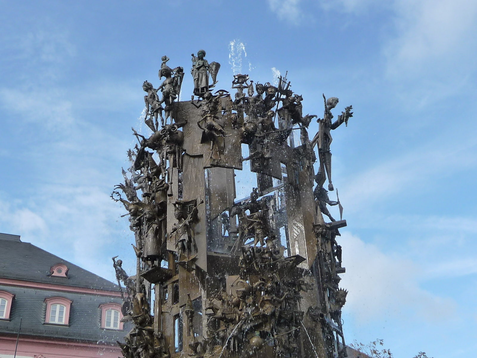 Der Fastnachtsbrunnen in Mainz hat die Funktion, die närrische Jahreszeit widerzuspiegeln.